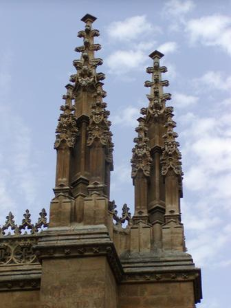 Capilla real